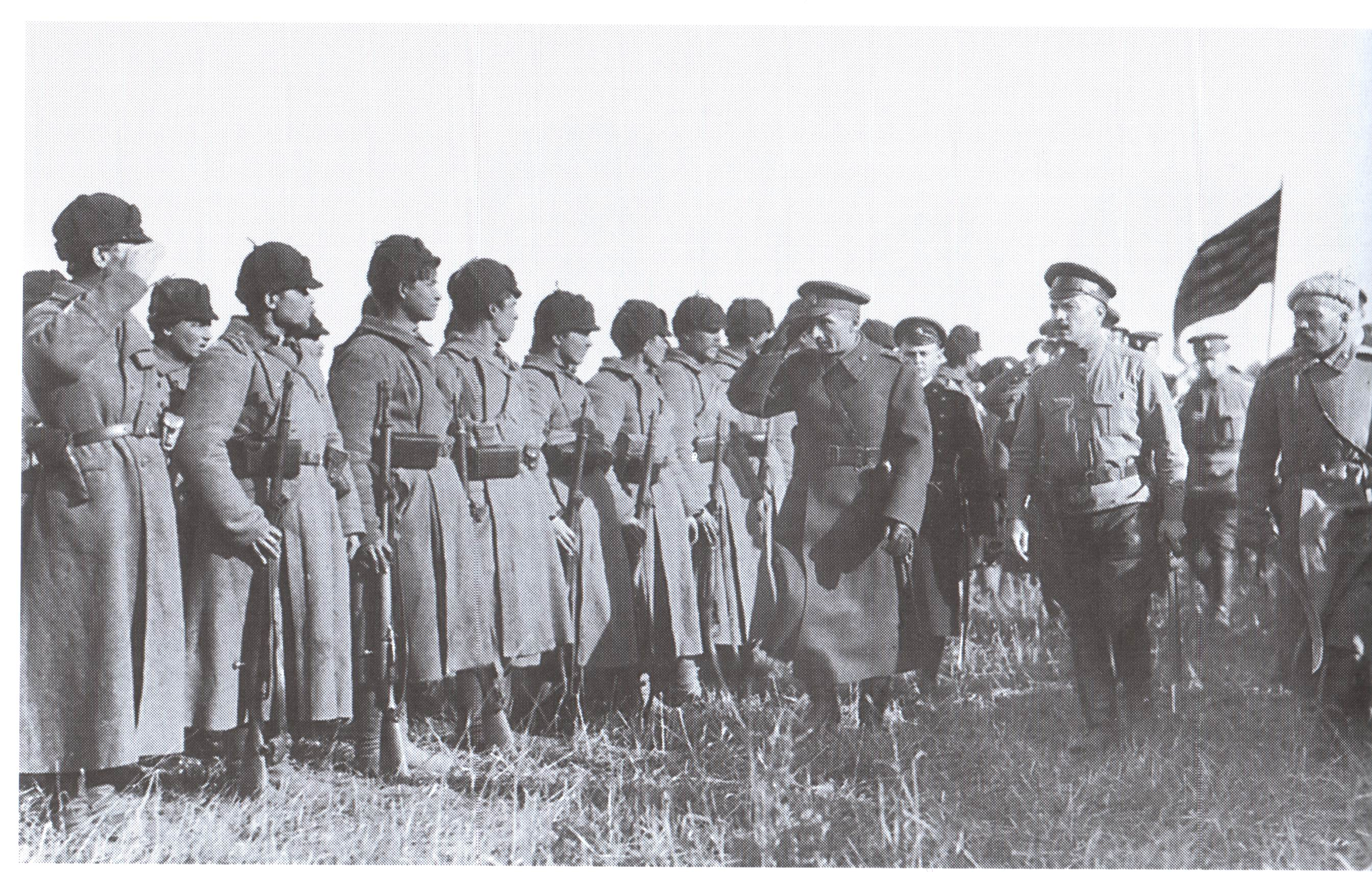 А.В. Колчак в действующей армии